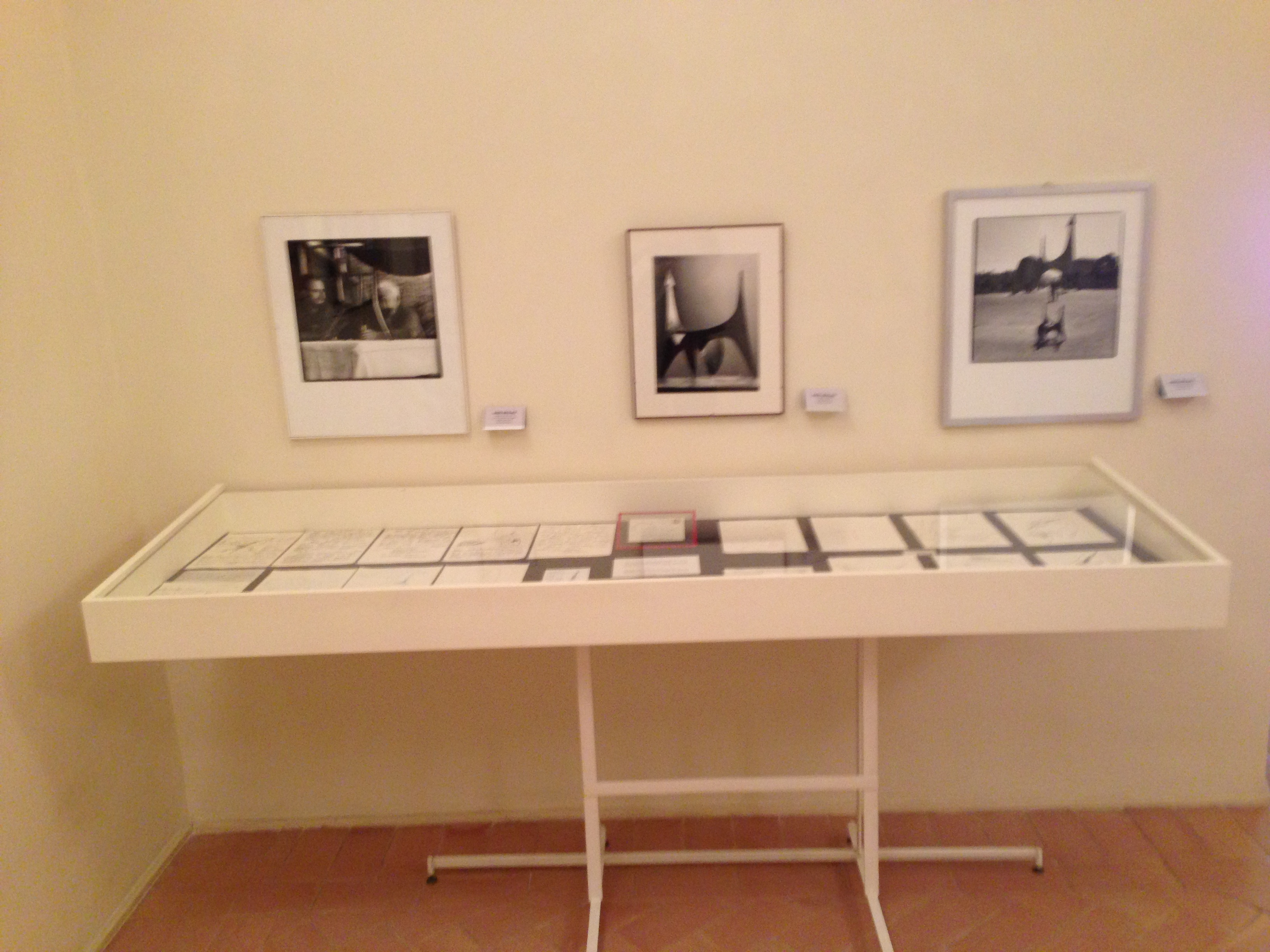 Museo Carandente Spoleto. Foto Ugo Mulas